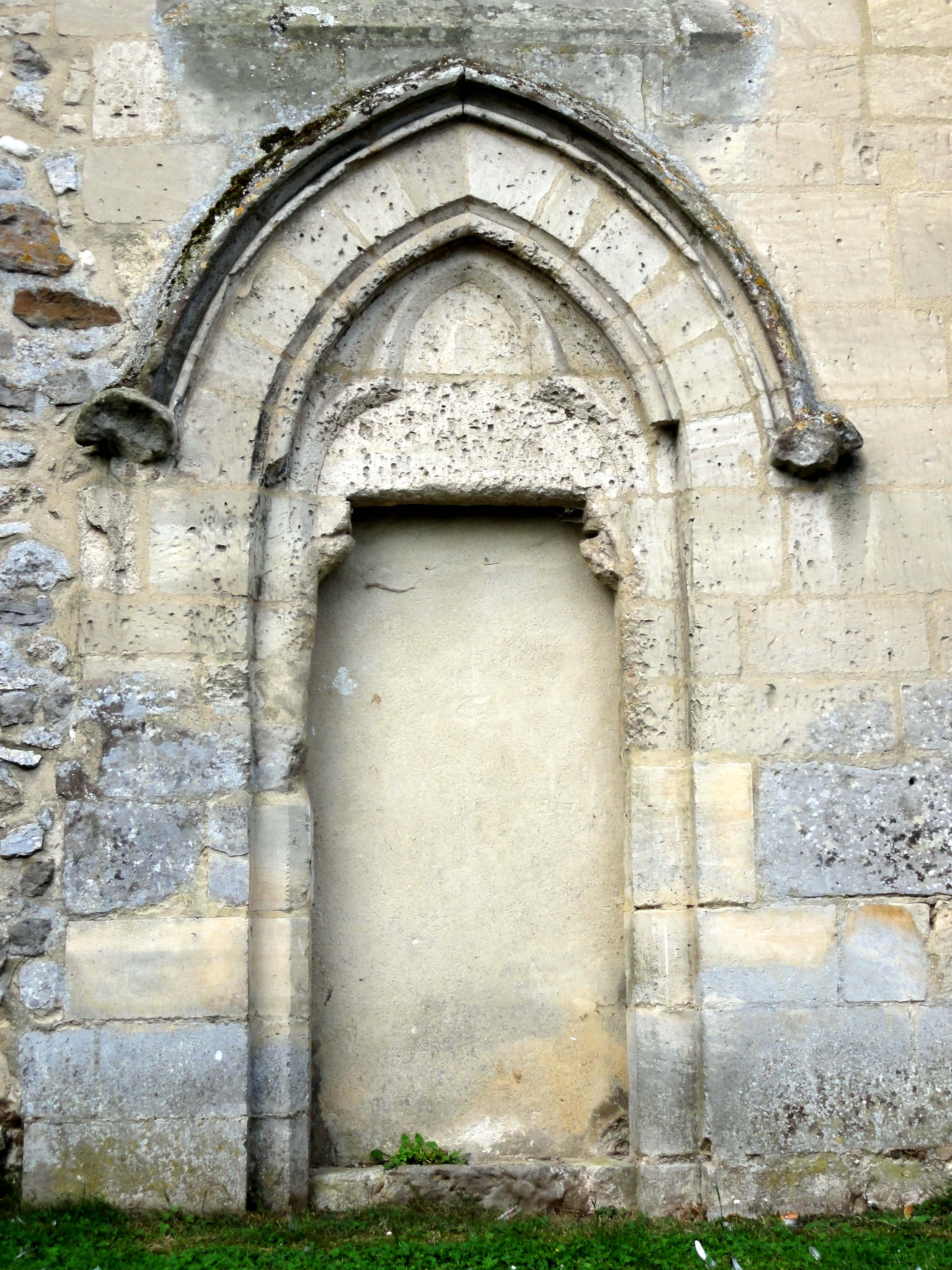 Église Sainte-Marie-Madeleine du Bellay-en-Vexin (voir titre).